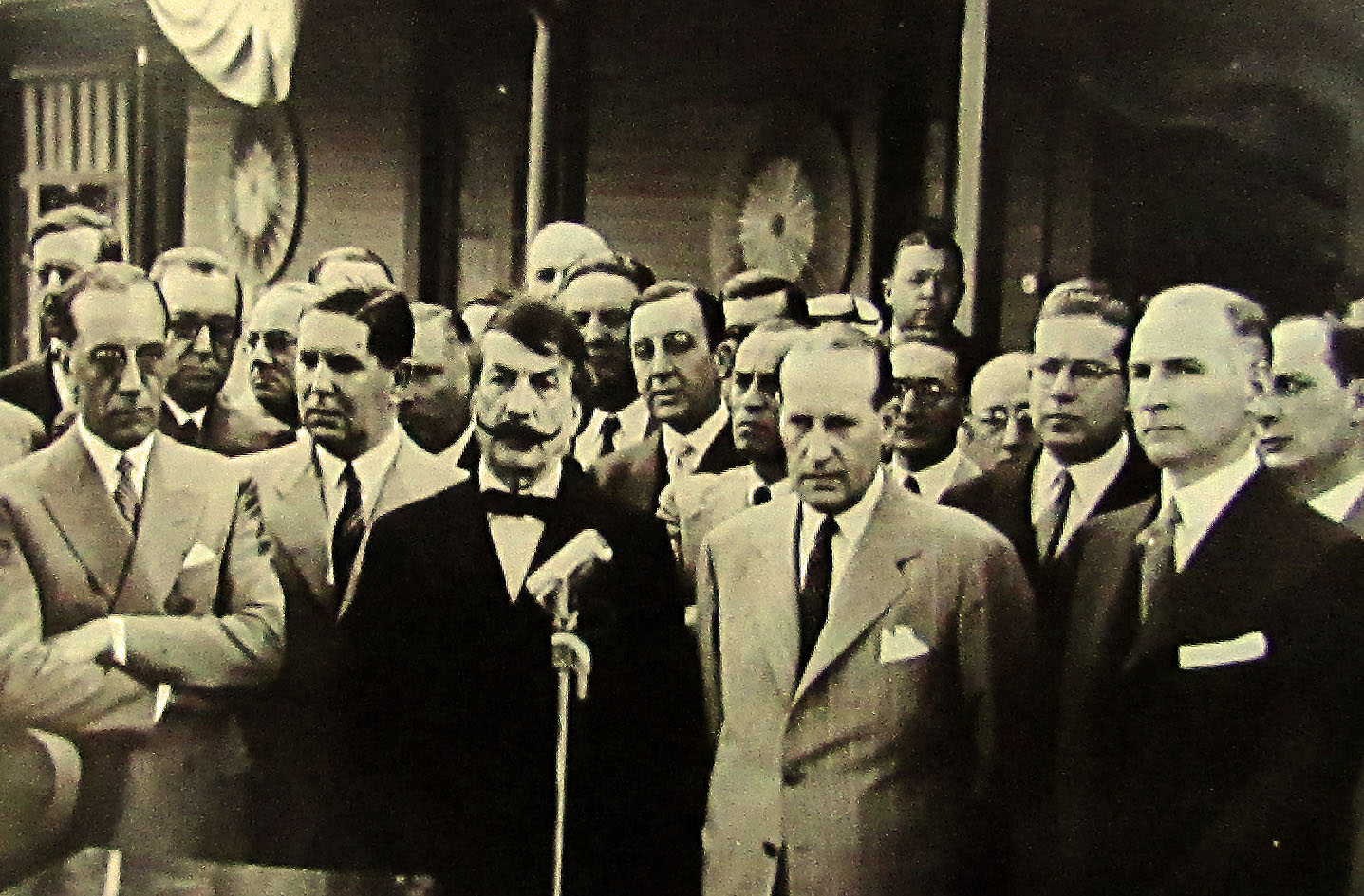 Alfredo Palacios, siendo presidente de la UNLP, al frente de un acto, en diciembre de 1942.